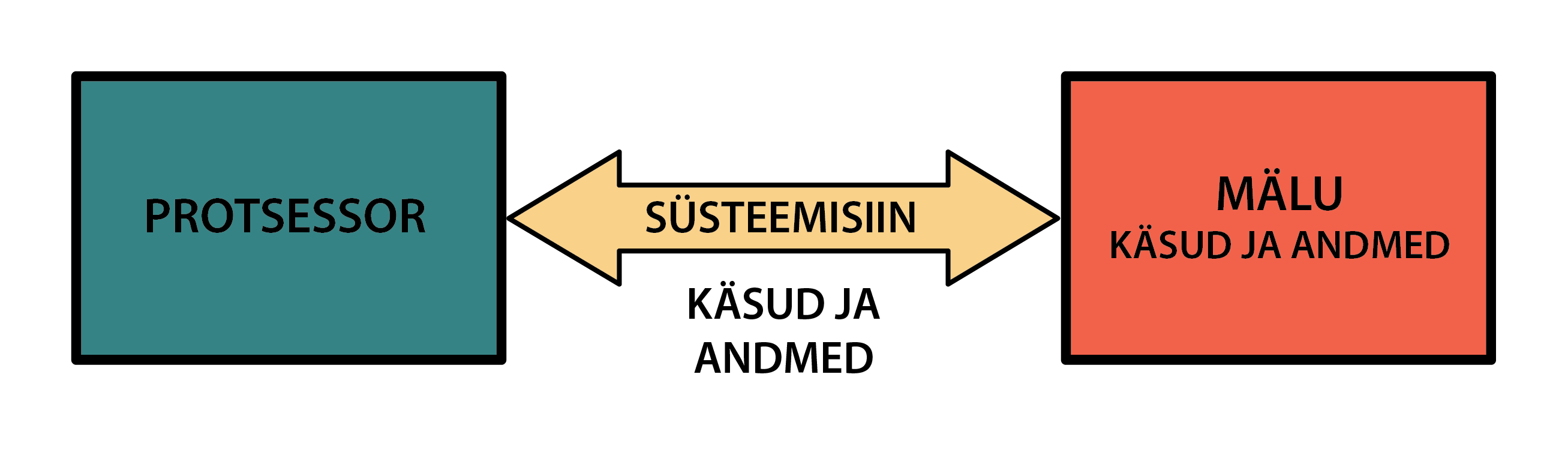 Von Neumanni arhitektuuri iseloomustav skeem.